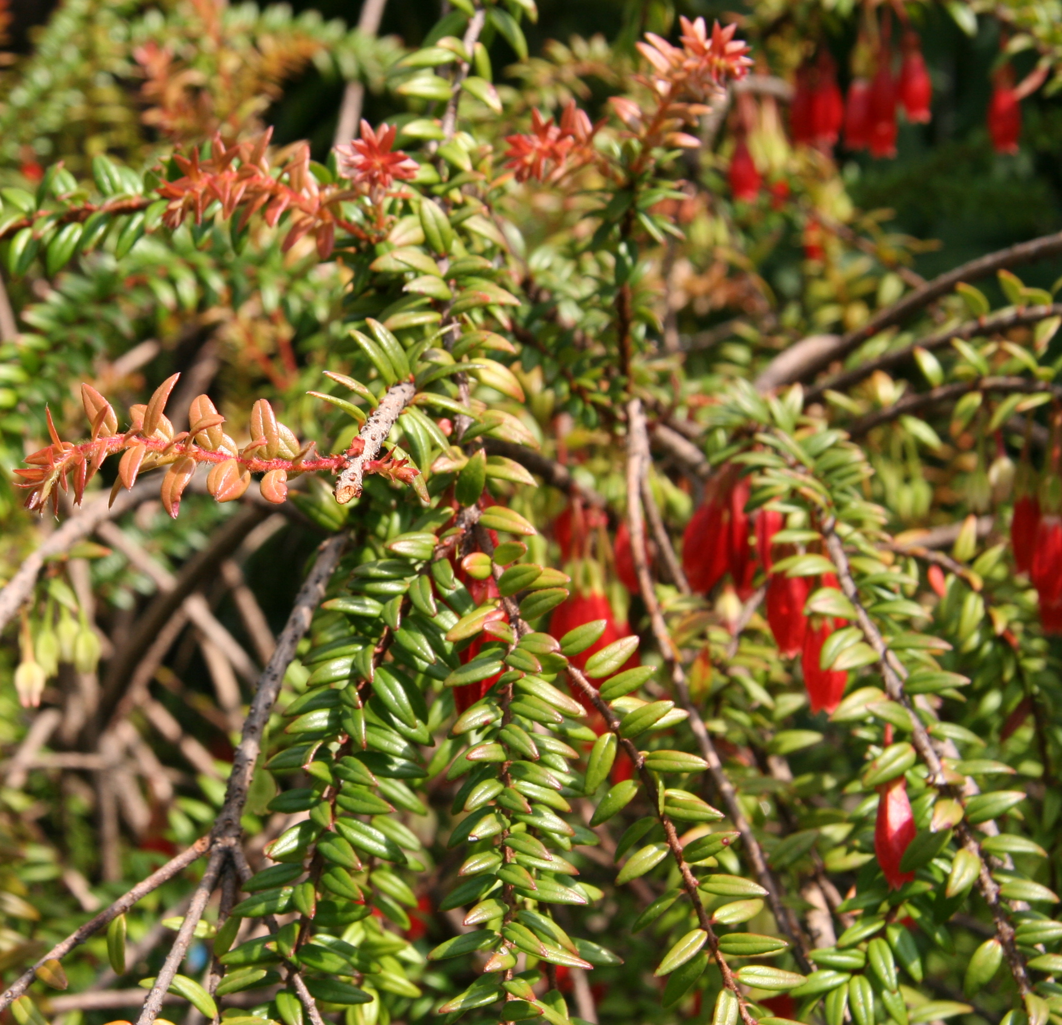 Agapetes serpens im Botanischen Garten Dresden